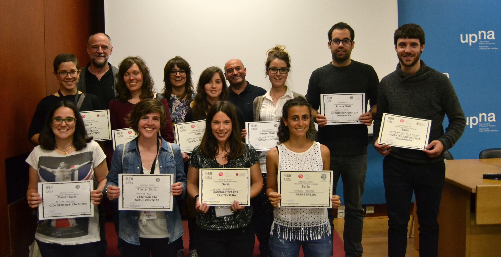 UEUko Iñaki Alegriarekin eta Udalbiltzako ordezkariarekin argazkian Ikergazte Kongresuko saridunak Nafarroako Unibertsitate Publikoan 2017ko maiatzean: Garazi Arrula Ruiz, Aratz Ramirez de la Piscina Arrillaga, Amaiur Esnaola, Ania Ibarguren , Olatz Goñi Balentziaga, Jaione Etxebarria Elezgarai, Begoña Altuna Díaz, Beñat Garaio, Nagore Elu Arantzamendi, Gotzone Hervás, eta Haritz Iribas Pardo.